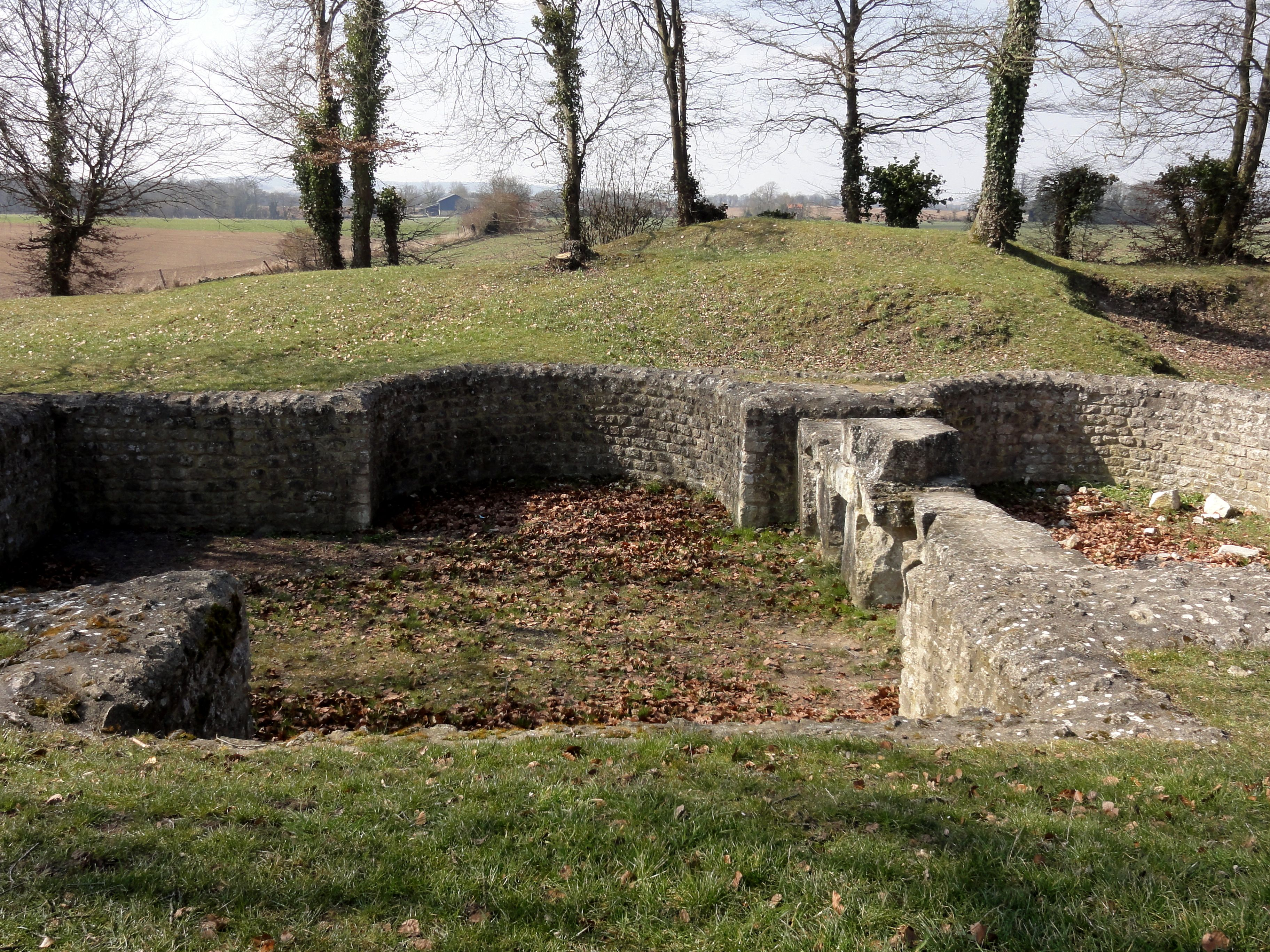 Thermes ; sudatorium.